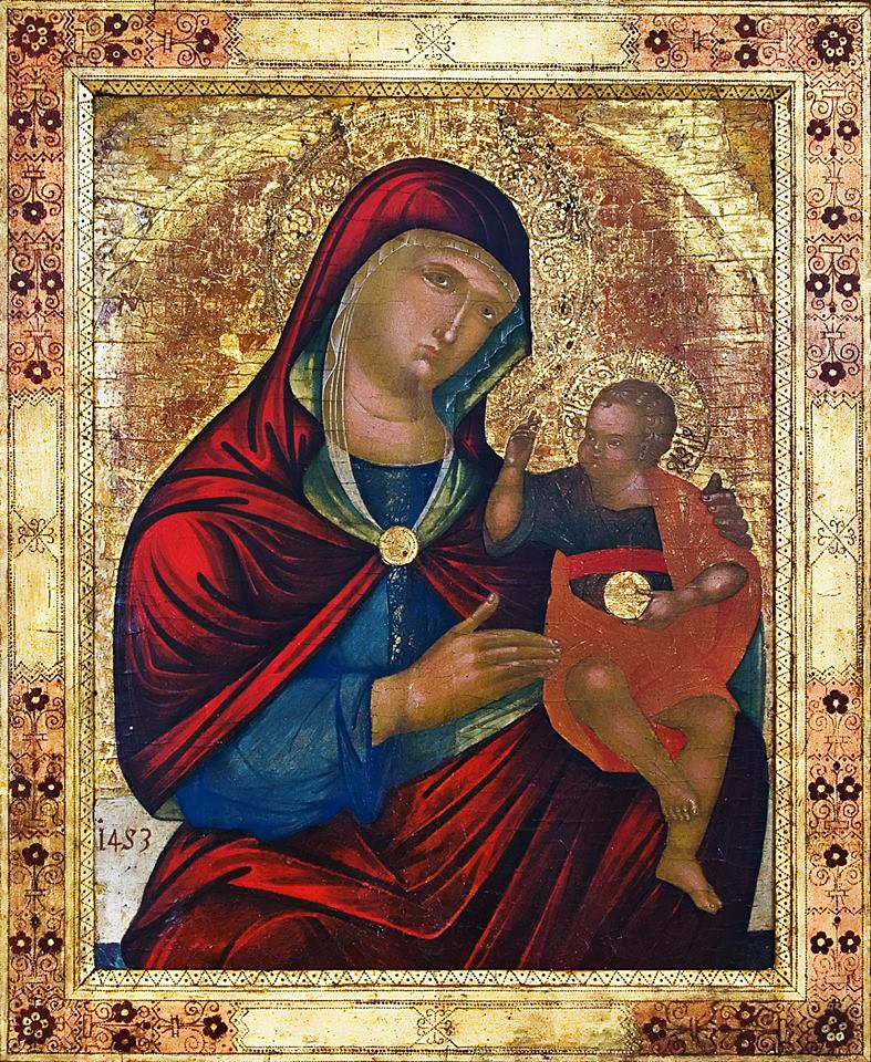 Мукачівська чудотворна ікона Бгородиці